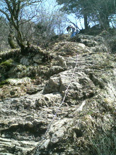 大峯奥駈道・大峰山（山上ヶ岳）へ至るための鐘掛岩の鎖場